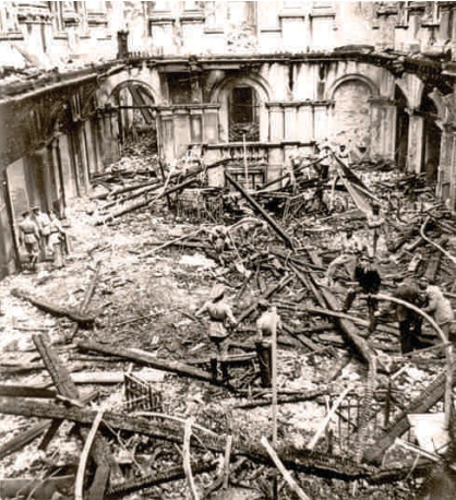 Vista do hall de entrada da ala norte da estação da Luz, destruído pelo incêndio.